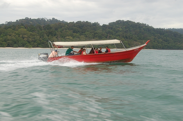 Bot ke Pulau Besar Basah.